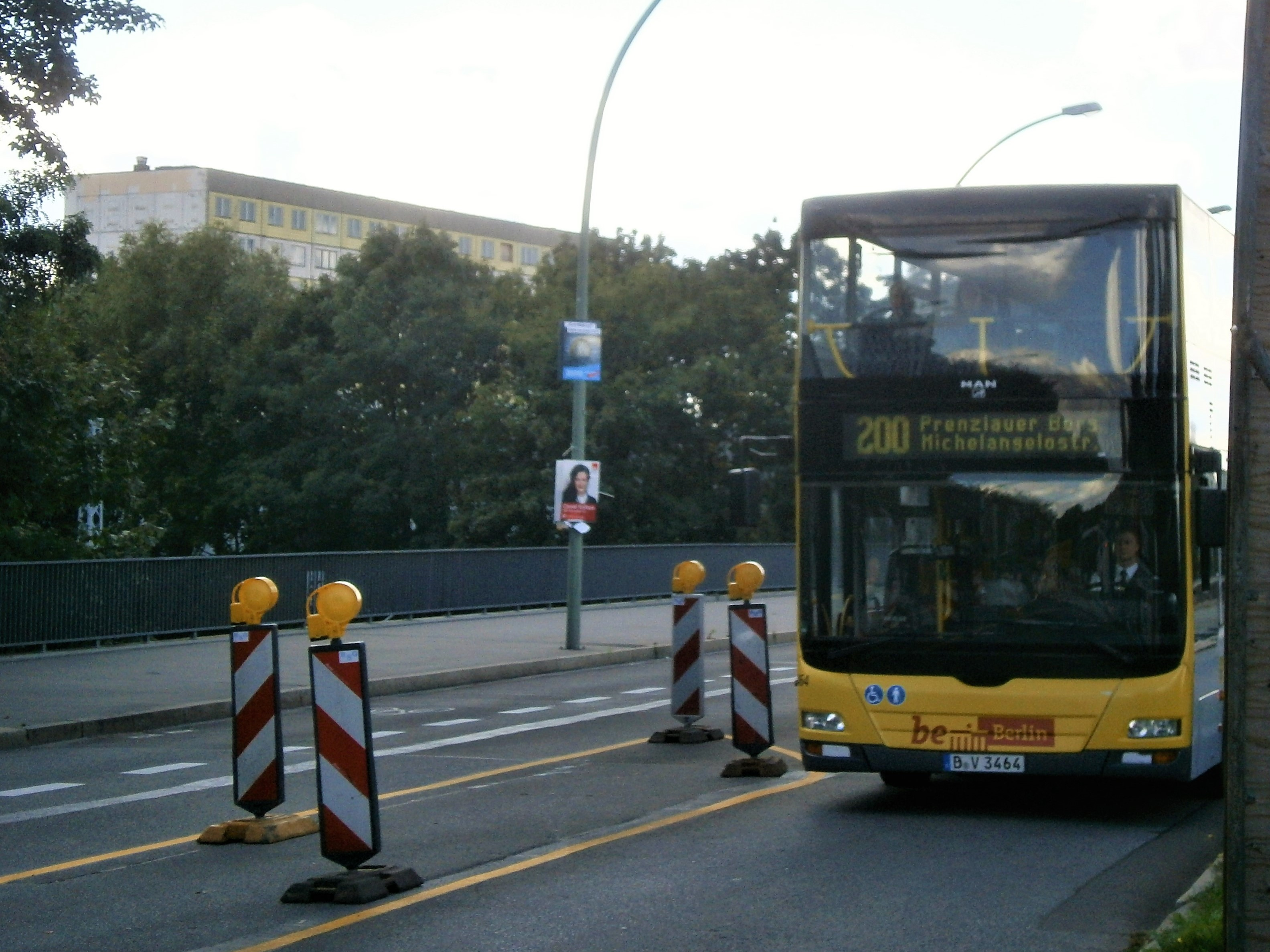 Die Kniprodestraße ist ein Verkehrszug im Berliner Bezirk Pankow, Ortsteil Prenzlauer Berg mit Grundstückszählung in Hufeisen. Bild